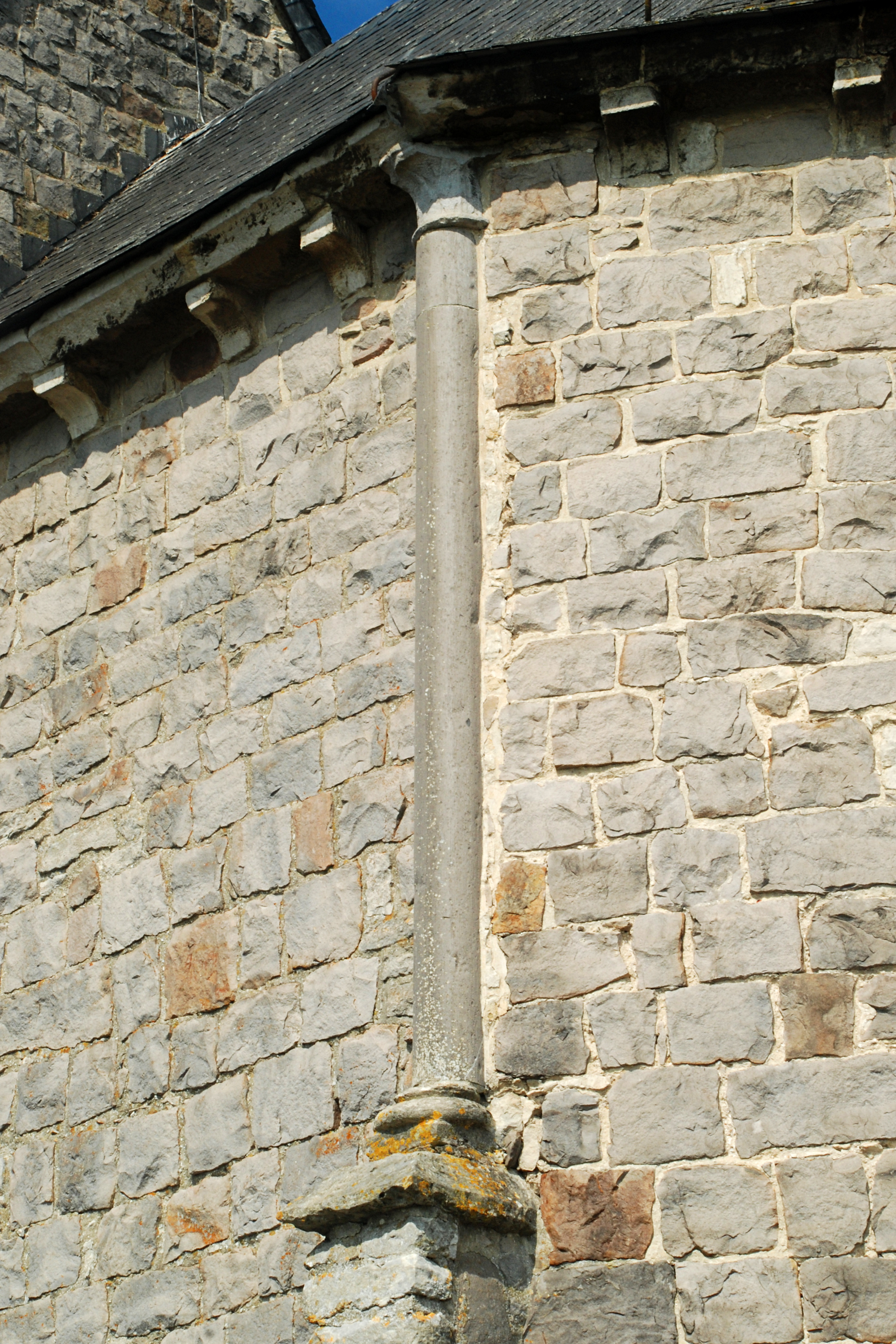 Belgique - Brabant wallon - Jodoigne - Piétrain - Chapelle Sainte-Catherine d'Herbais